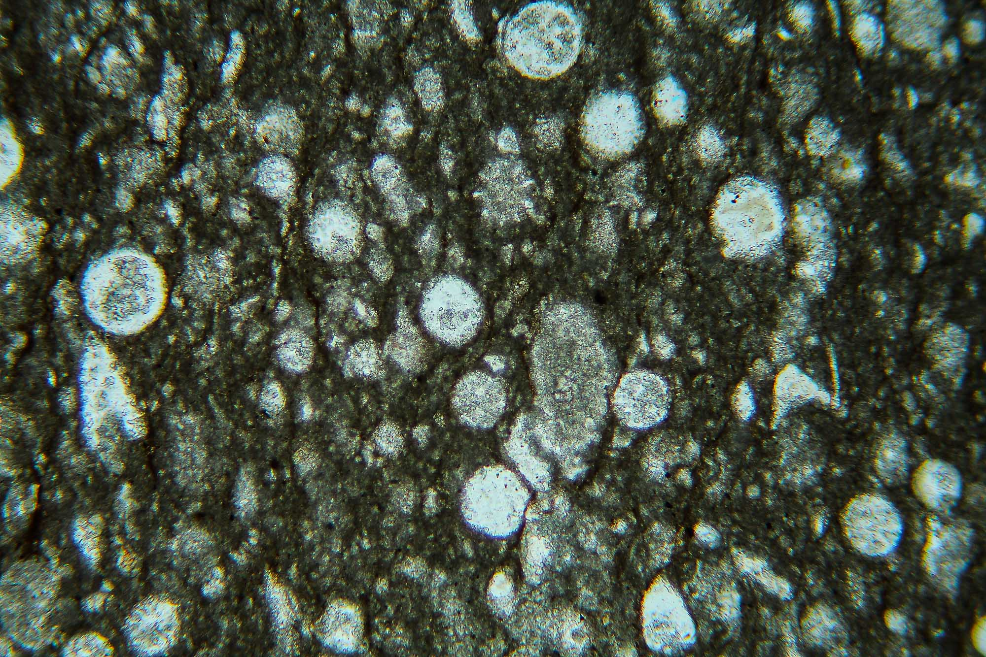 Wetzsteinkalk, Ammergauer Alpen, Dünnschliff mit Radiolarienskeletten